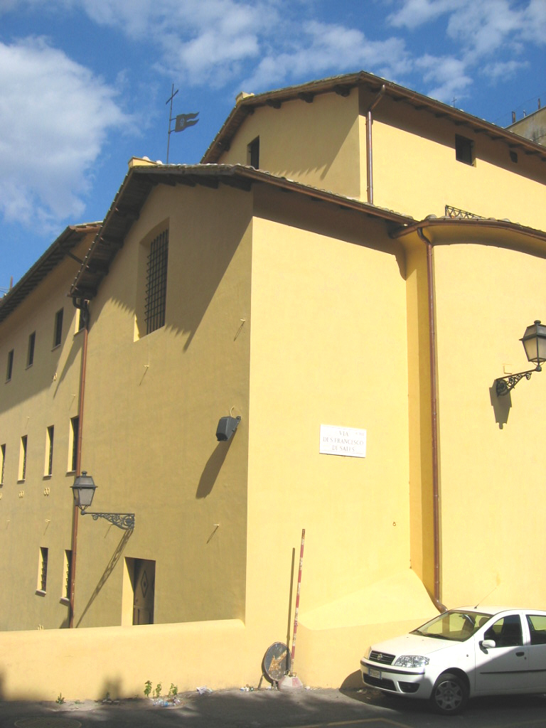 Chiesa di Santa Maria della Visitazione e San Francesco di Sales, Trastevere, Roma. Riaperta al culto nel 2005.